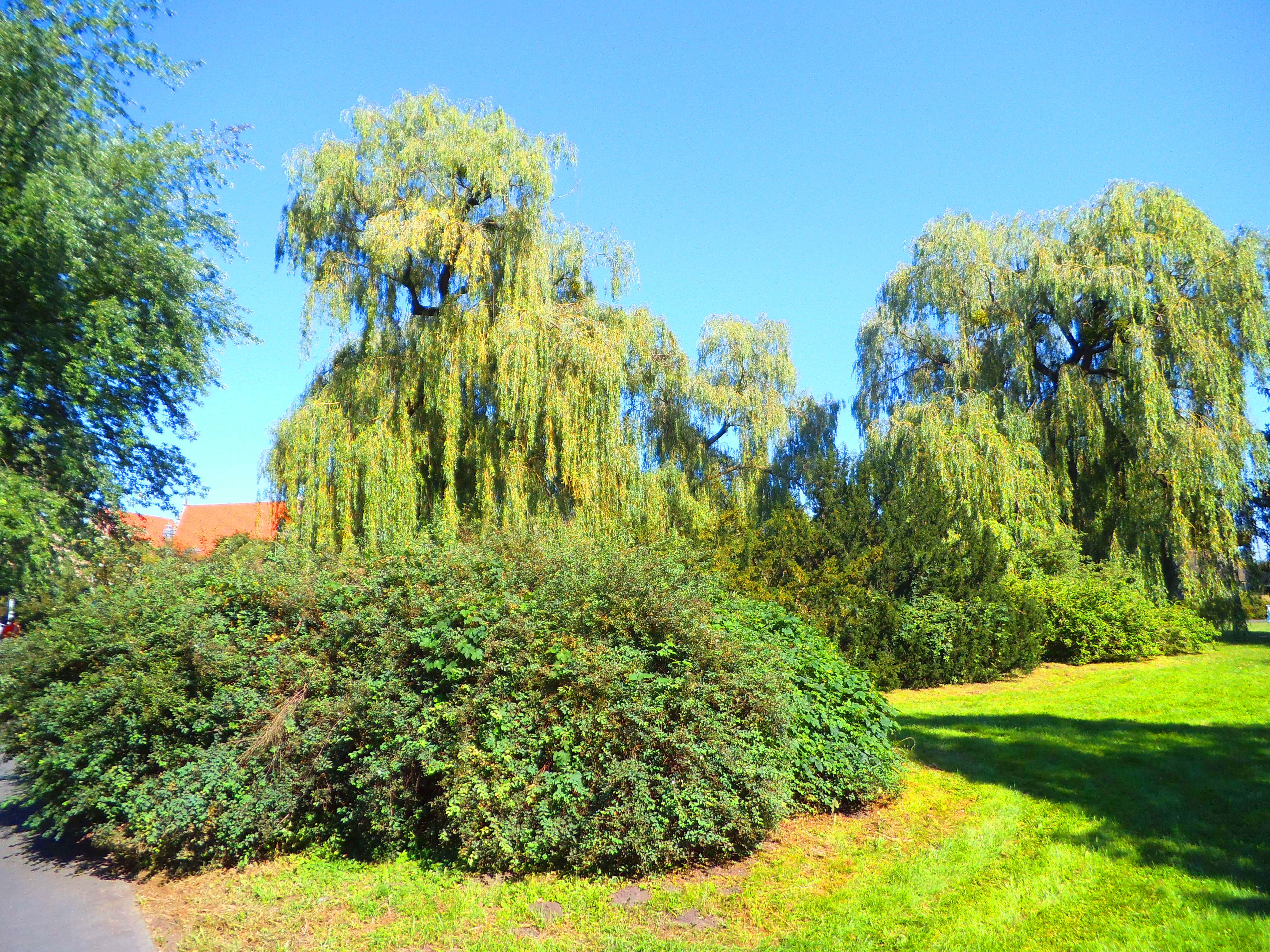 Dolina Marzeń w Toruniu12